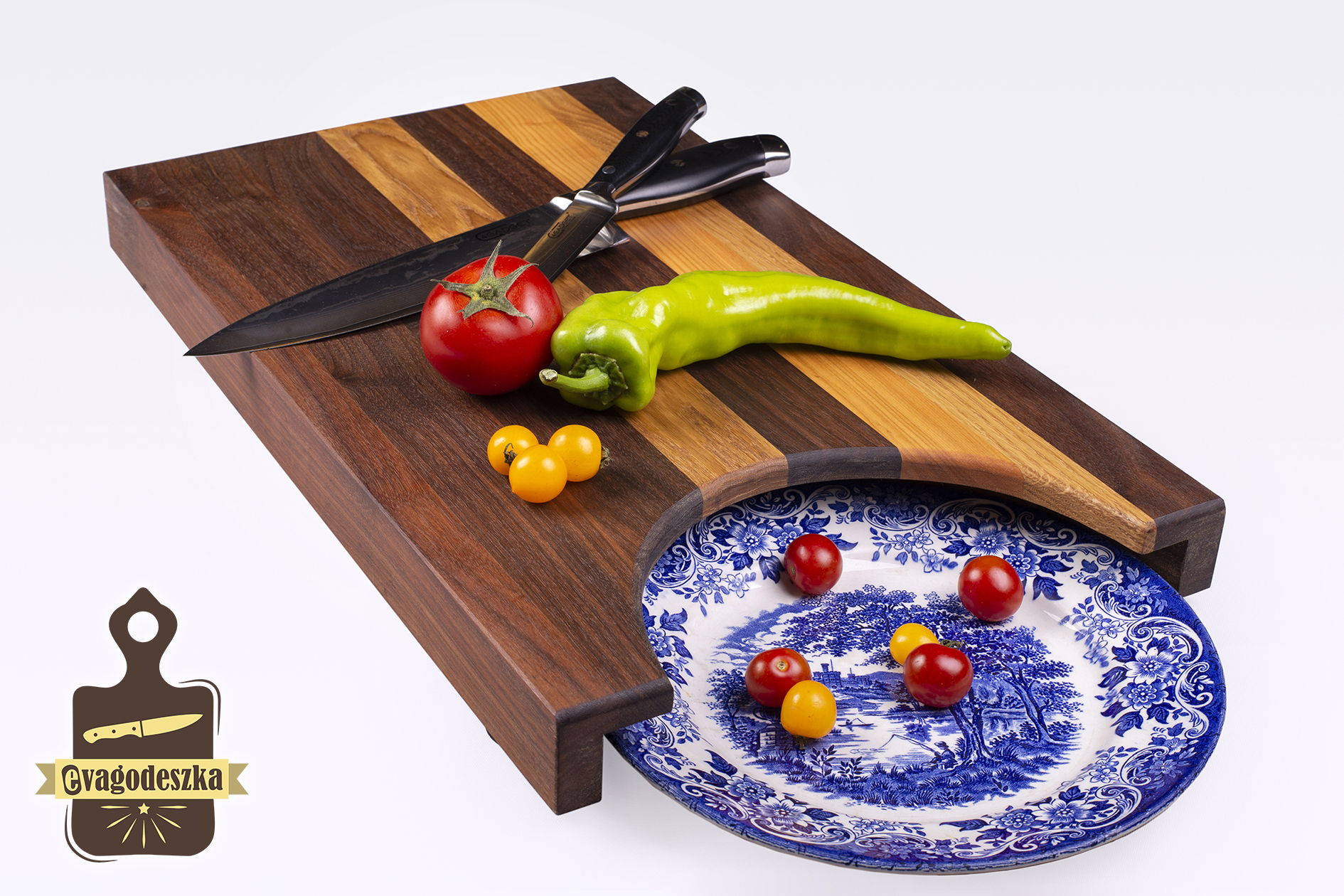 Praktikus, nagy méretű fa vágódeszka többfajta fából, kézzel gyártott Bio kezelő anyagokkal.